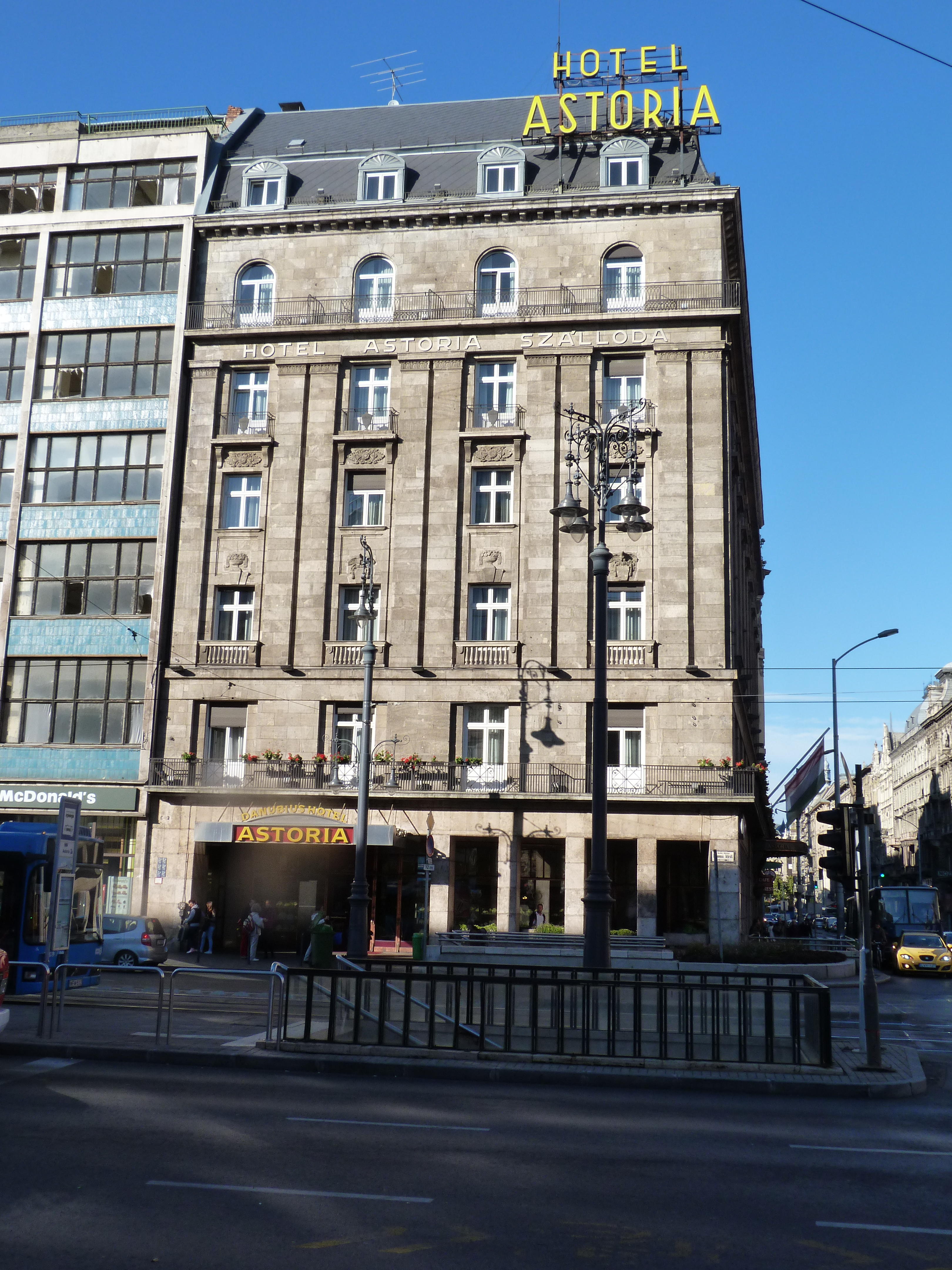 A felvétel 2013. szeptember 18 -án készült Budapesten, az Astoriánál. ©© Derzsi Elekes Andor, Budapest, 2013, You are authorised to use these photos and vids under Creative Commons – even for commercial, for profit purposes. Photos must be attributed to Derzsi Elekes Andor. All of the photos and vids in the Metapolisz DVD line are under Creative Commons and can be used even for commercial – for profit – purposes. Recommended Citation Derzsi Elekes Andor: Metapolisz DVD line